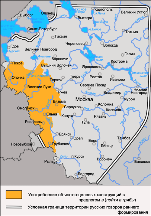 Карта распространения диалектного явления русского языка в области синтаксиса: употребление объектно-целевых конструкций с предлогом в типа пойти в грибы. Источник: Бромлей С. В., Булатова Л. Н., Захарова К. Ф. и др. Русская диалектология / Под ред. Л. Л. Касаткина — 2-е изд., перераб. — М.: Просвещение, 1989. — ISBN 5-09-000870-1, с. 131